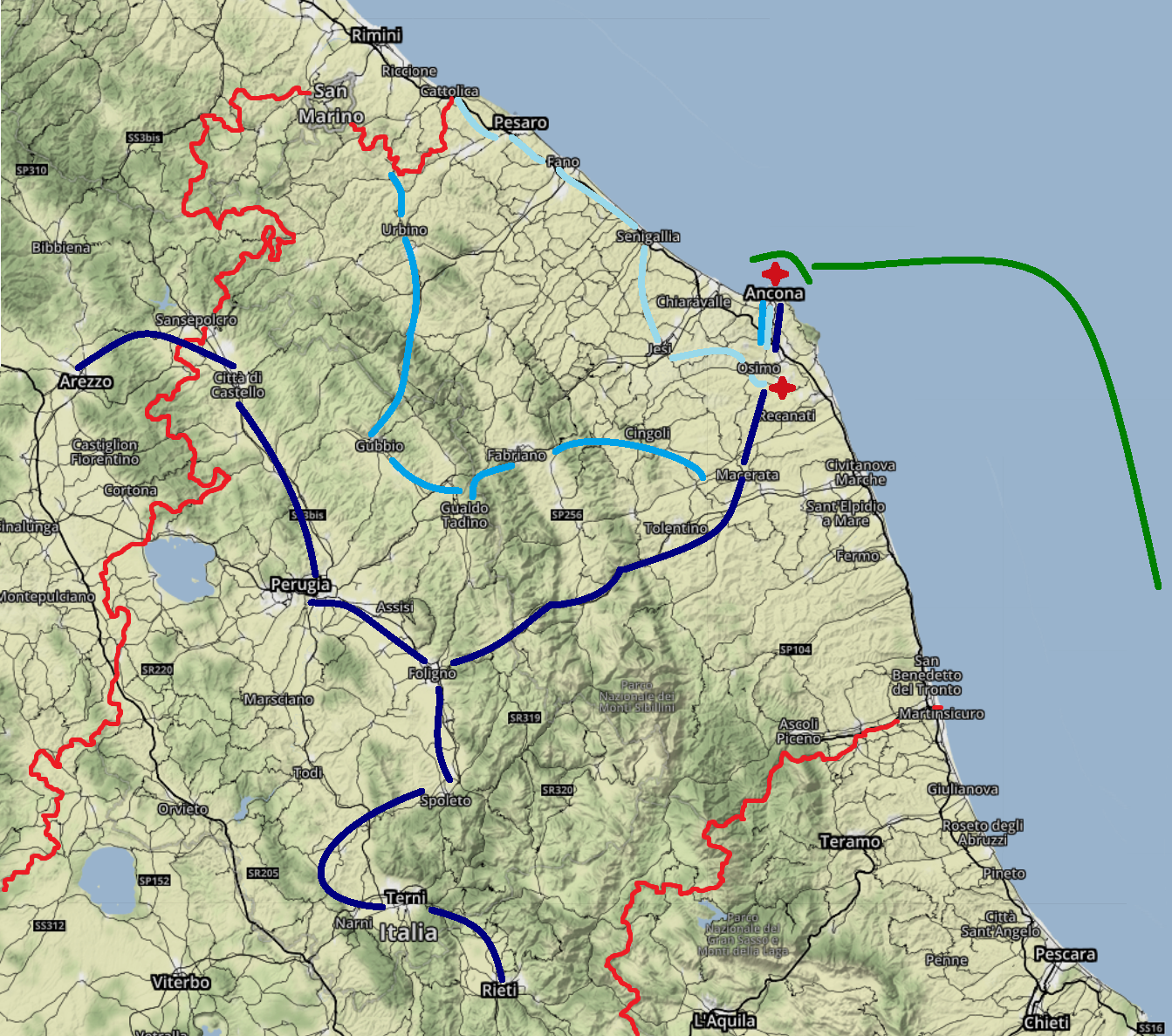 Invasione sabauda dello Stato pontificio